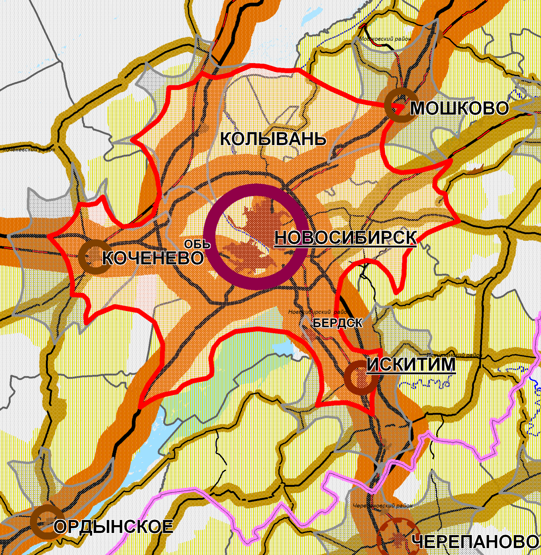 Схема территориального планирования Новосибирской области. Планировочный каркас. Выделена в отдельный файл территория Новосибирской агломерации